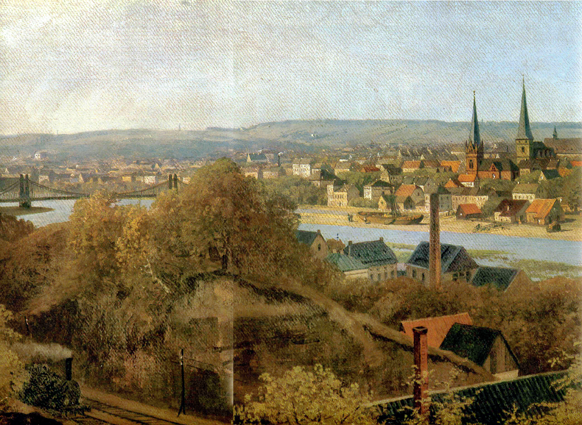 Stadtansicht von Mülheim an der Ruhr - Blick auf das rechte Ruhrufer mit der neuen Bahnbrücke (links), der Kettenbrücke (davor), den drei Kirchen (lutherische, reformierte und katholische Kirche von li. nach re.) und der Bahnlinie Broich (Mülheim) - Kettwig